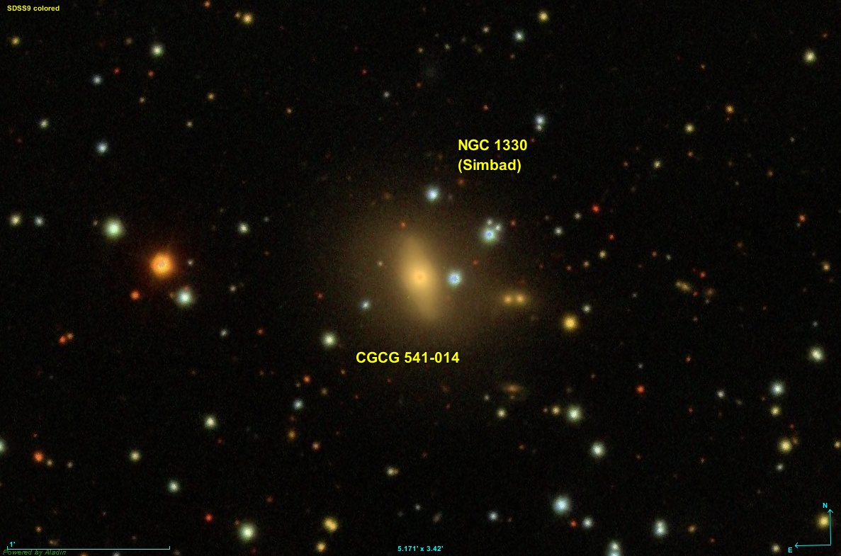 Image créée à l'aide du logiciel Aladin Sky Atlas du Centre de Données astronomiques de Strasbourg et des données de SDSS (Sloan Digital Sky Survey).